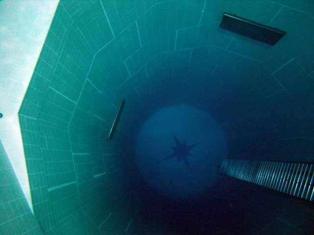 Nemo33 deep view